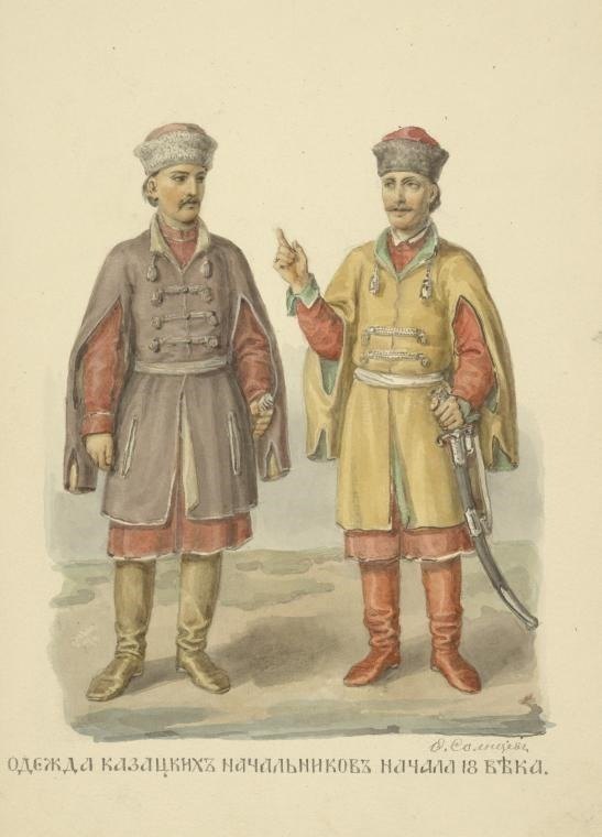 Одяг козацької старшини поч. 18 ст.